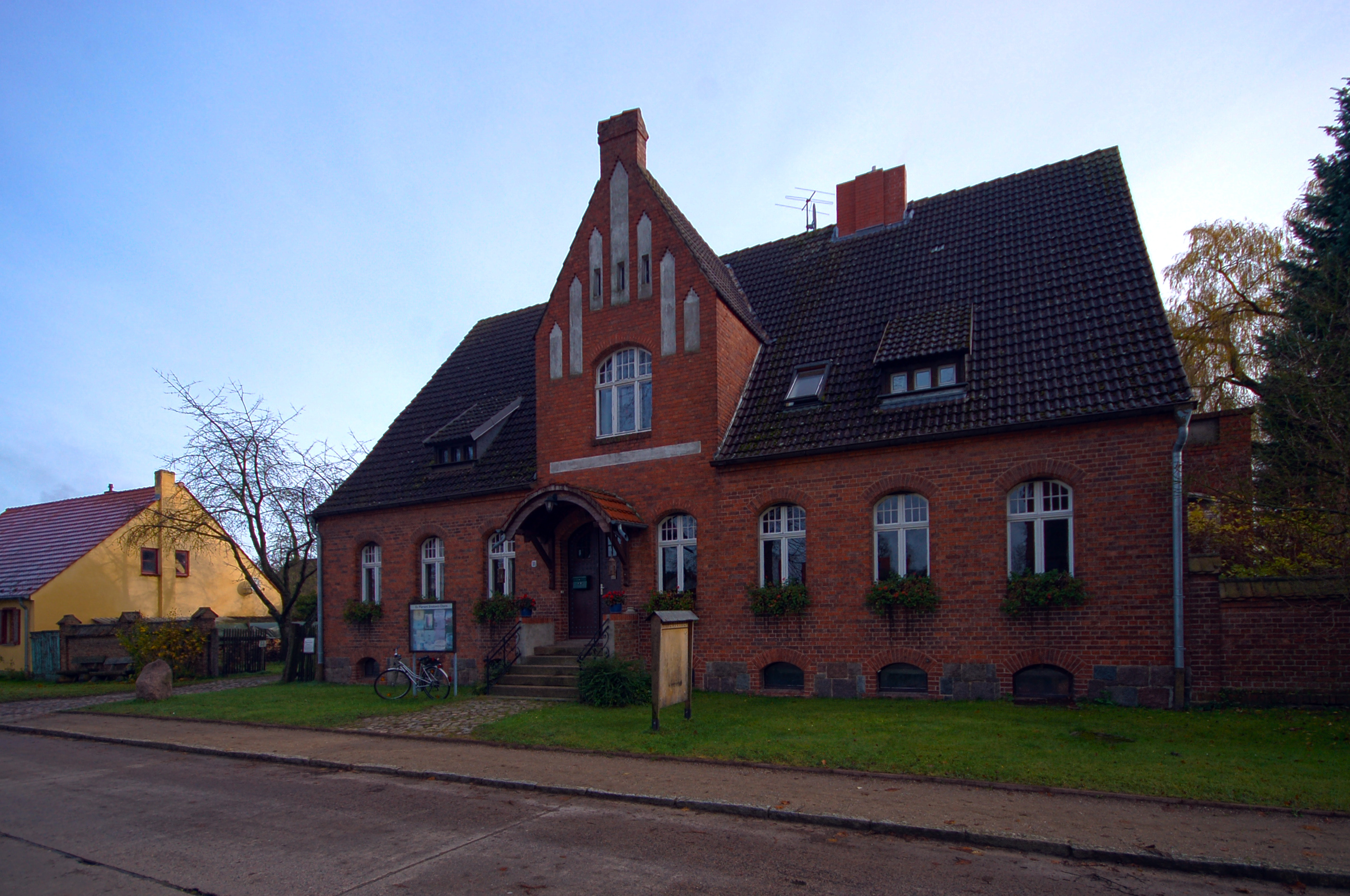 Brodowin